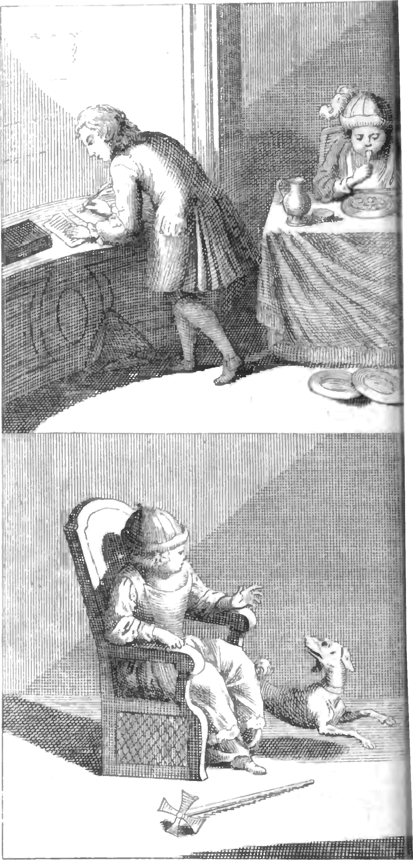 Planche de l'Orthopédie, de Nicolas Andry, 1743 (2 vol.)